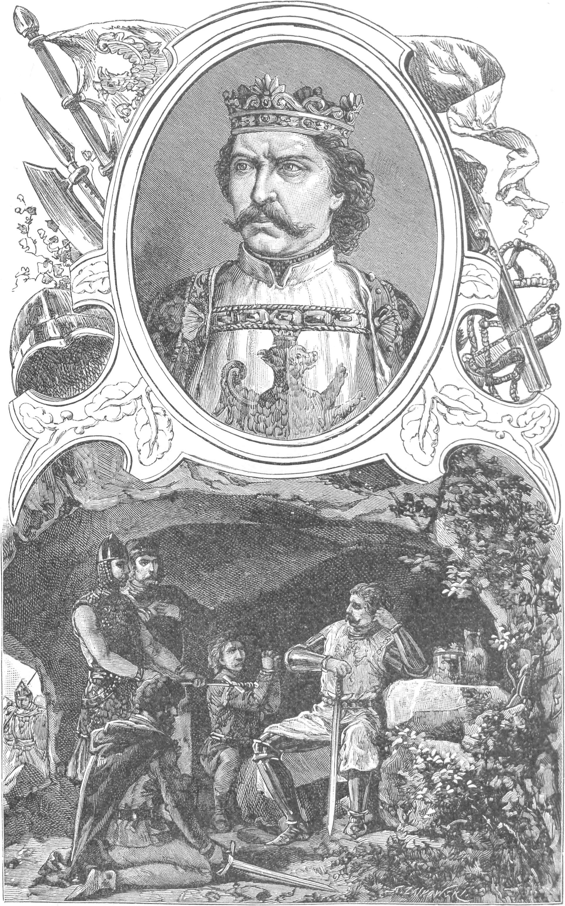 ilustracja z książki „Wizerunki książąt i królów polskich“